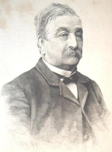 Il sindaco di Milano conte Giulio Belinzaghi